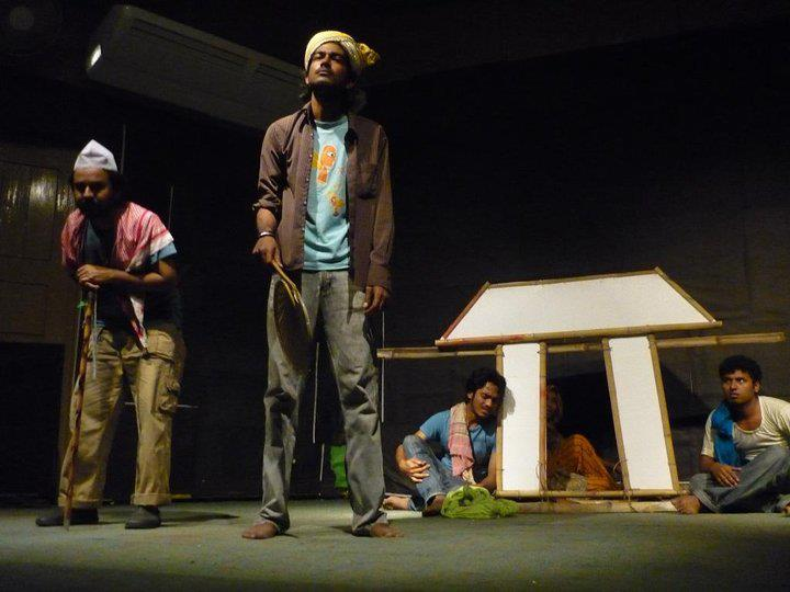 ২০১১ সালের ১মার্চ, নবীন বরন ও সাংগঠনিক সপ্তাহ-২০১১ উপলক্ষে নাটকটির ৭ম প্রদর্শনী, মিনি অডিটোরিয়াম, শাবিপ্রবি।